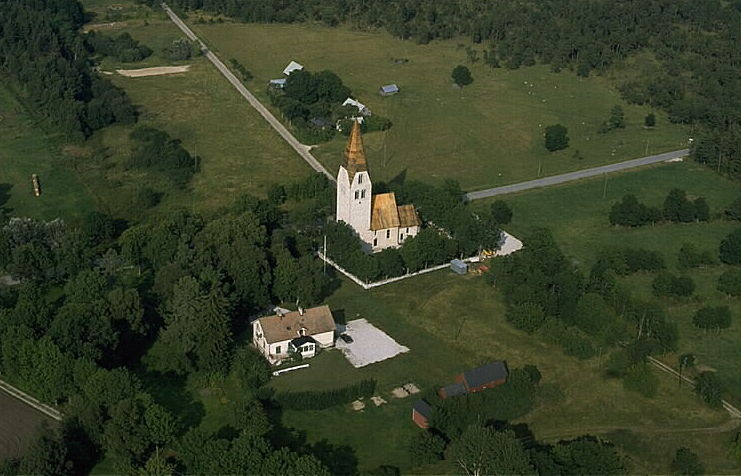 Motiv: Ganthems kyrka Nyckelord: Flygbilder, Riksintressen Kategori: KyrkomiljöGanthems kyrka